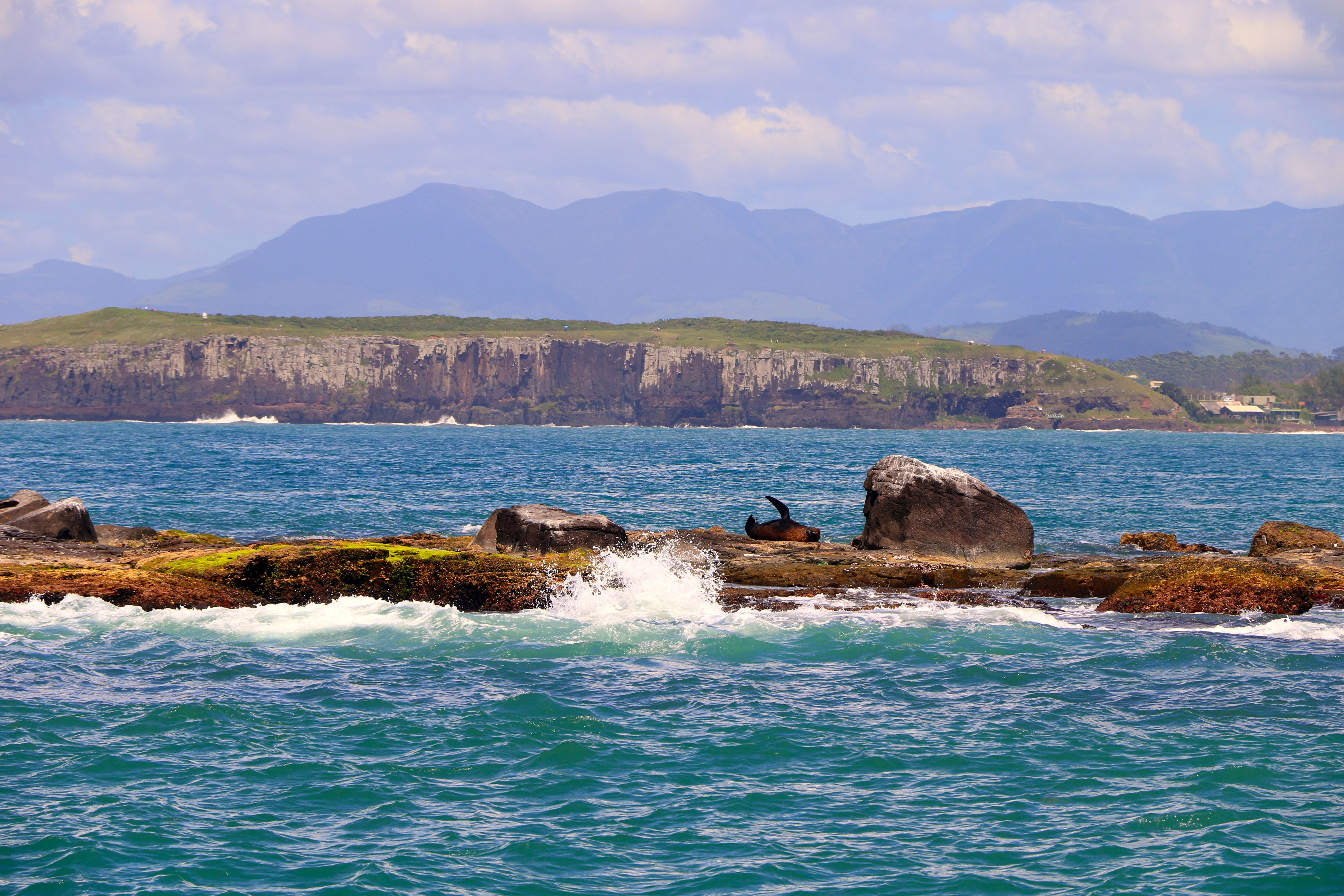 Aqui uma vista do mar para a terra, do parque da Guarita com a Ilha dos Lobos em primeiro plano. Canon 7D, fotografia de fevereiro de 2018